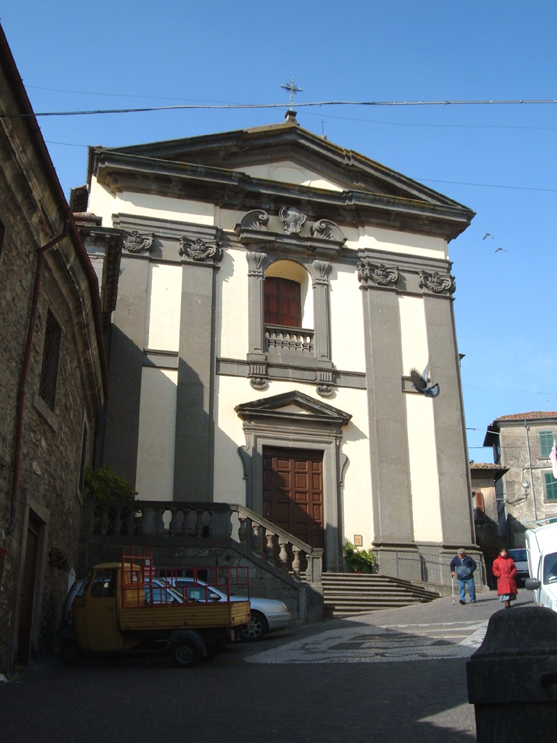 Soriano nel Cimino, provincia di Viterbo. Chiesa di Sant'Eutizio.